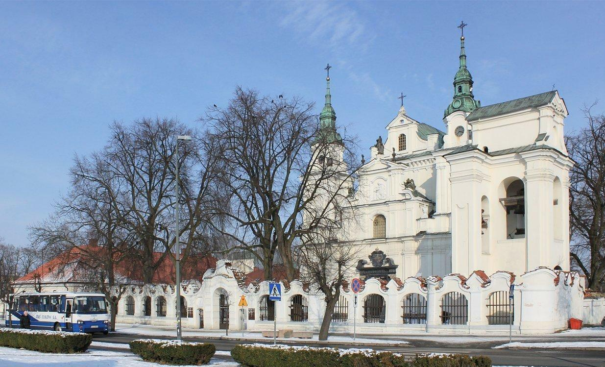 Bazylika św. Anny w Lubartowie. Po prawej stronie, w narożniku południowo-zachodnim, stoi dzwonnica w stylu późnobarokowym. Znajdują się na niej trzy dzwony, na parterze mieści się kaplica. Bardzo ciekawy jest mur okalający świątynię: tak jak dzwonnica utrzymany w stylu późnego baroku o niespotykanej, falującej linii. Po lewej, za autobusem, widoczny dach zabytkowej, murowanej plebanii, pochodzącej z czasów budowy świątyni.